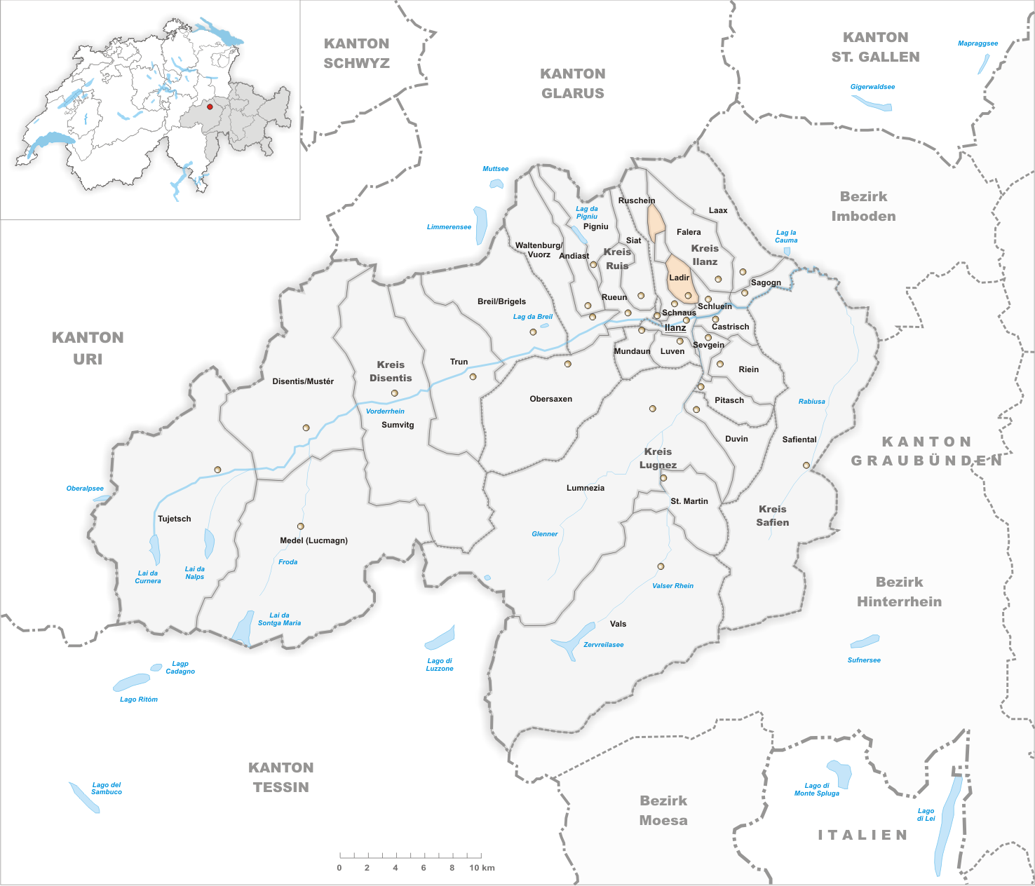 Municipality Ladir